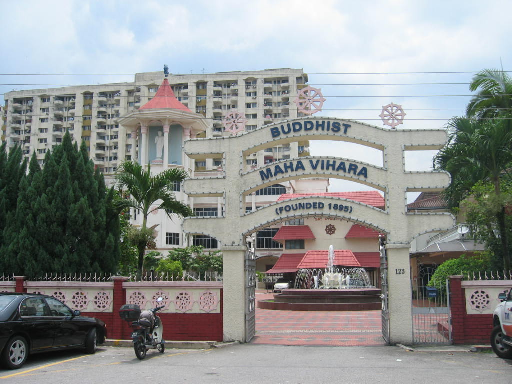 Self taken.